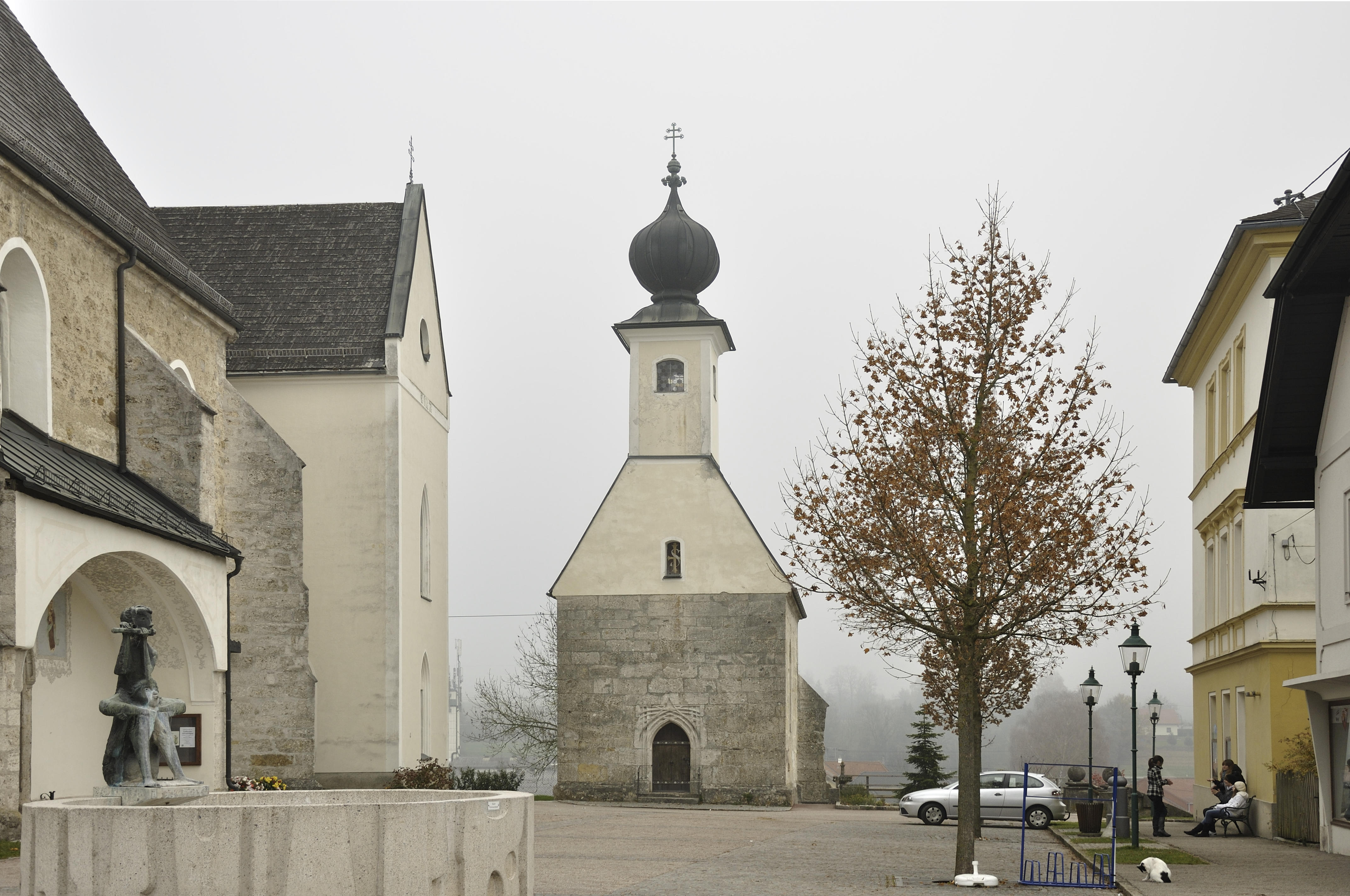 Annakapelle (Karner)